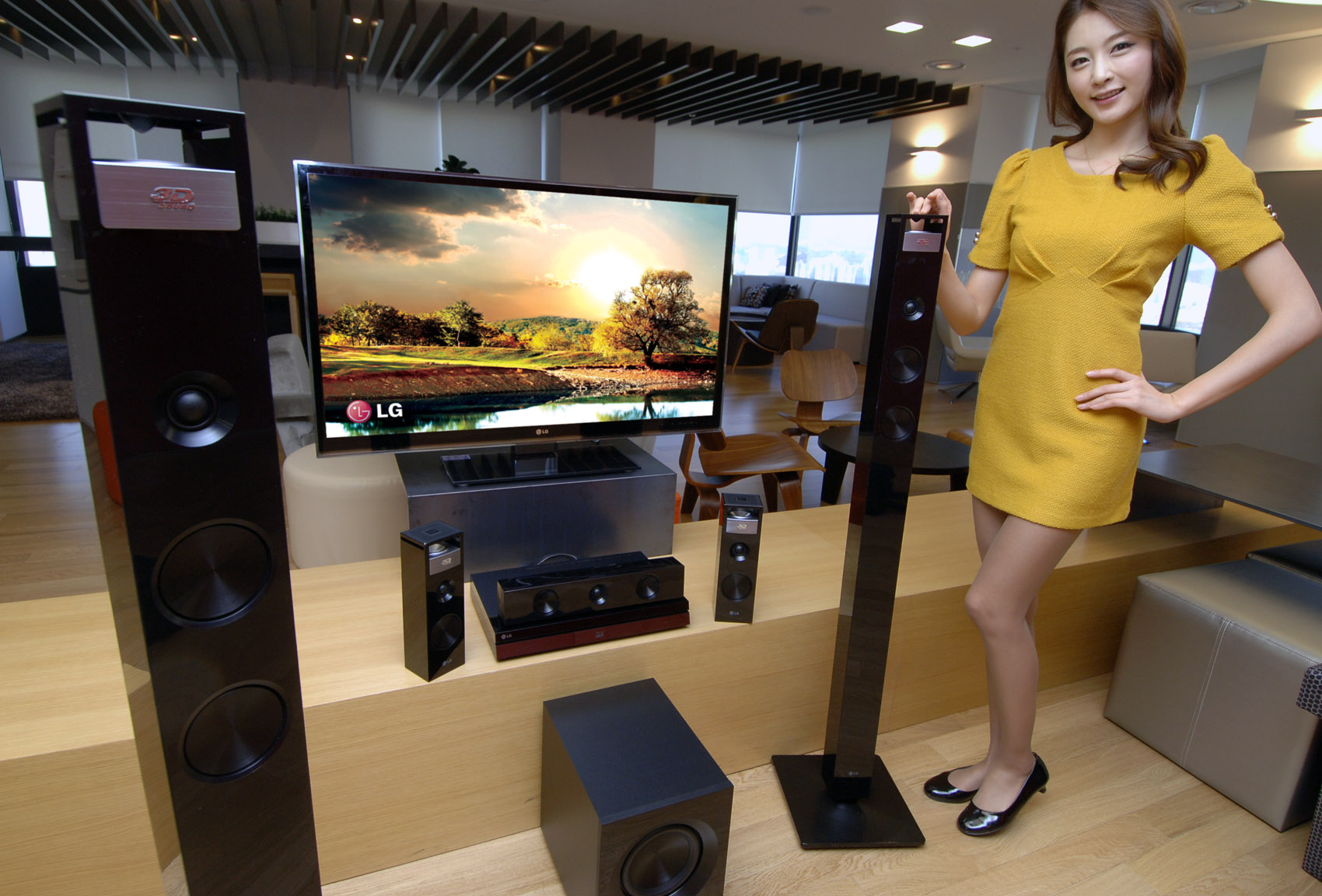 LG전자가 3D 영상에 최적화된 입체음향을 제공하는 3D 홈시어터 신제품 3종을 북미시장에 상반기 출시한다. LG전자는 3D TV에 이어 3D AV 시장도 공략해 '3D 홈 엔터테인먼트' 선두업체로 올라선다는 전략이다. 사진은 올 3월 북미 시장에 출시하는 3D 홈시어터 시스템(모델명: BH9420PW). ※ LG전자 뉴스룸 에서 관련 보도자료를 확인실 수 있습니다.